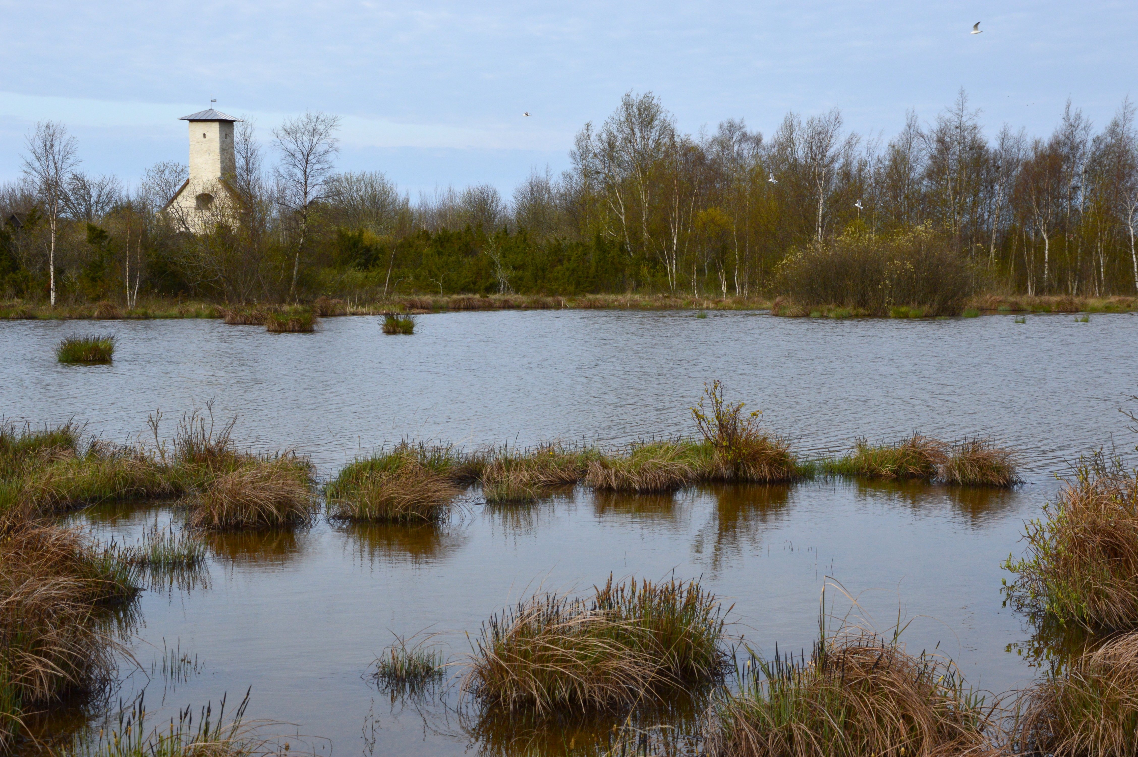 Kappelkärre jäänukjärv ja Osmussaare kabeli varemed.